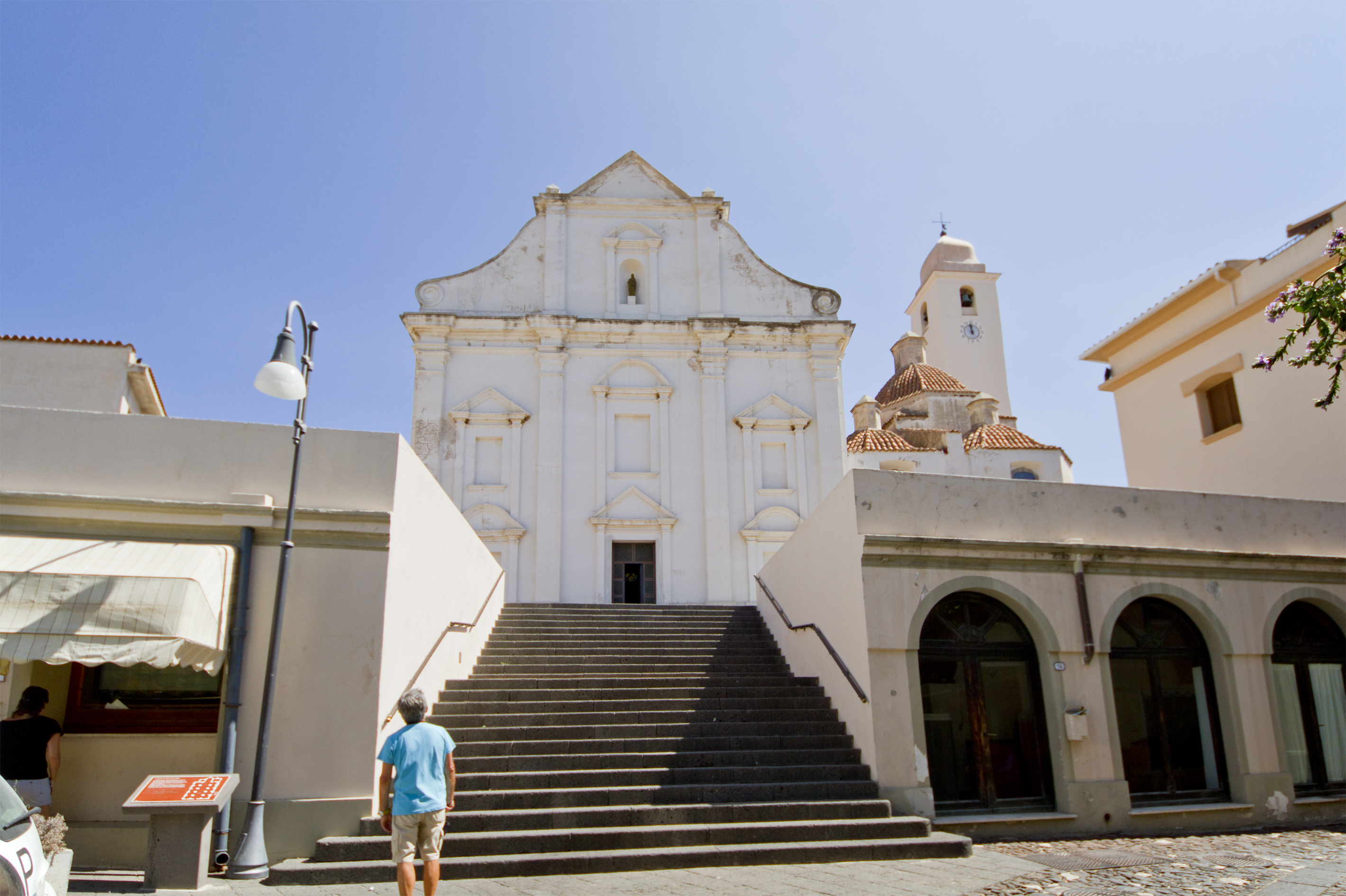 Chiesa di San Giacomo Maggiore, Orosei, Nuoro, Sardinia, Italy